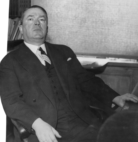 Georg Eugen Nielsen